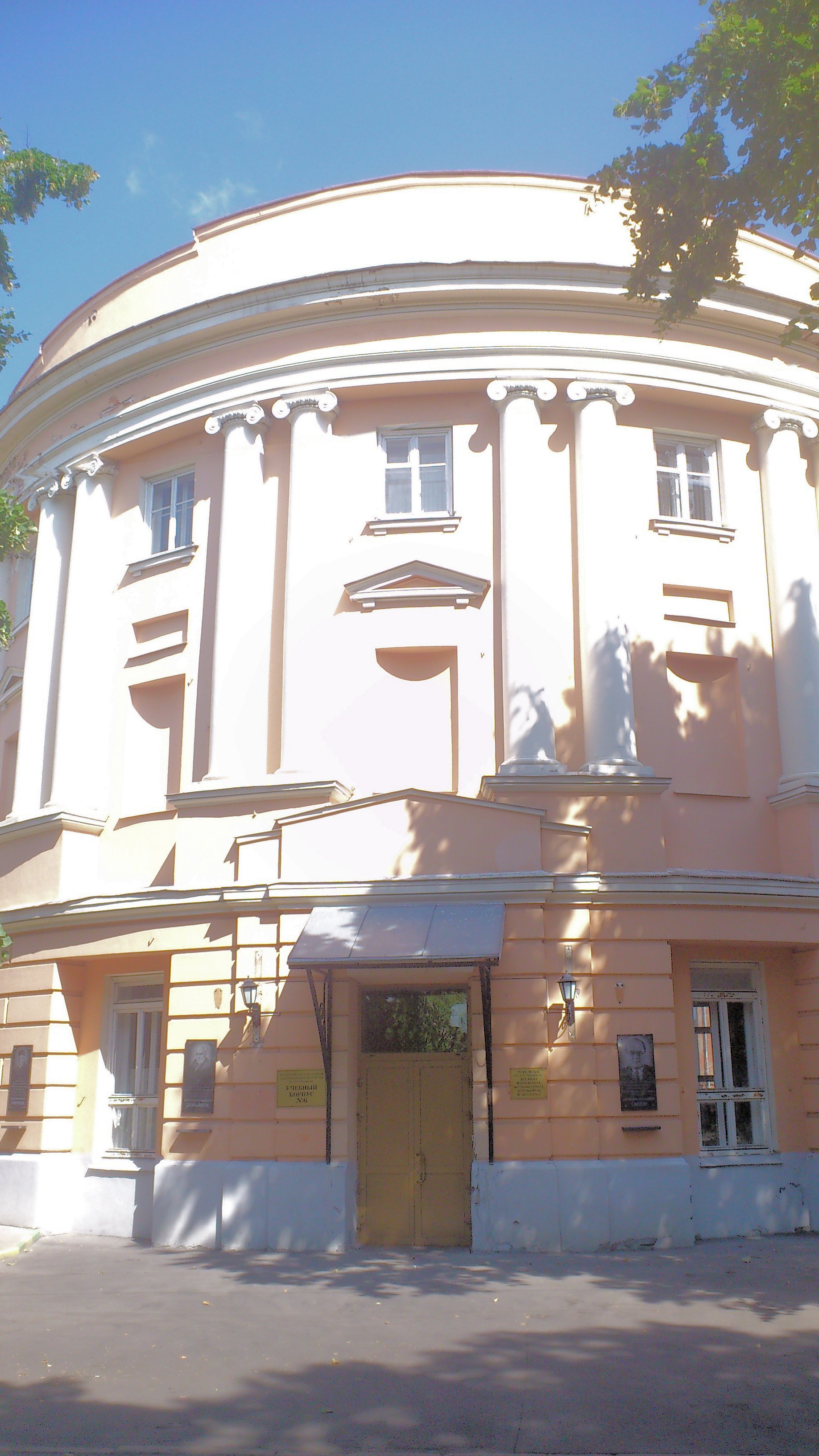 Учебный корпус № 6 Московской сельскохозяйственной академии имени К. А. Тимирязева. Москва, Тимирязевский проезд, дом № 2.